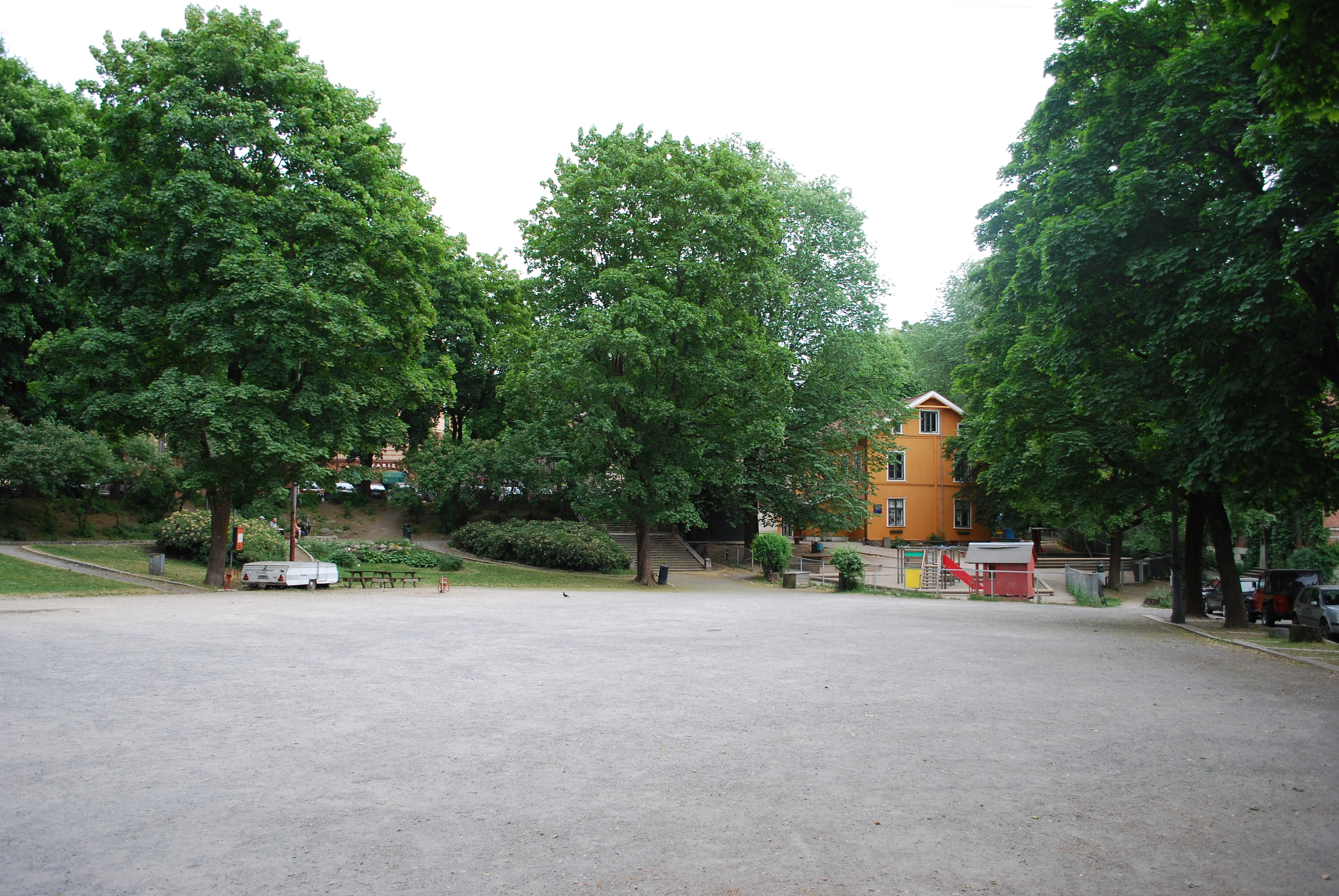 Amaldus Nielsens plass, Frogner, Oslo, sett mot øst